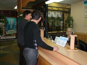 Отдел информации, регистрации и учета Костанайской ОУНБ им.Л.Н. Толстого